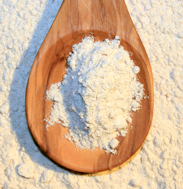 Amaranthmehl